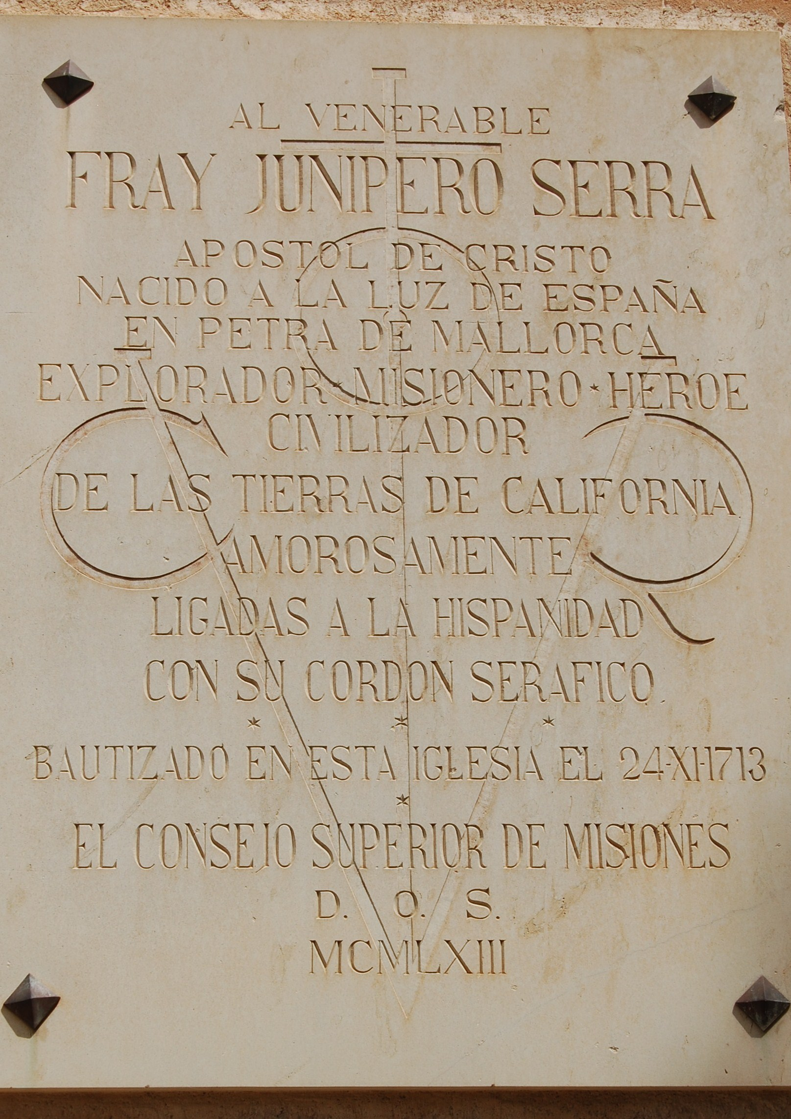 Gedenktafel für Bruder Junipero Serra an der Pfarrkirche San Pere in Petra (Mallorca), der in dieser Kirche noch am Tag seiner Geburt (24. November 1713) getauft wurde.